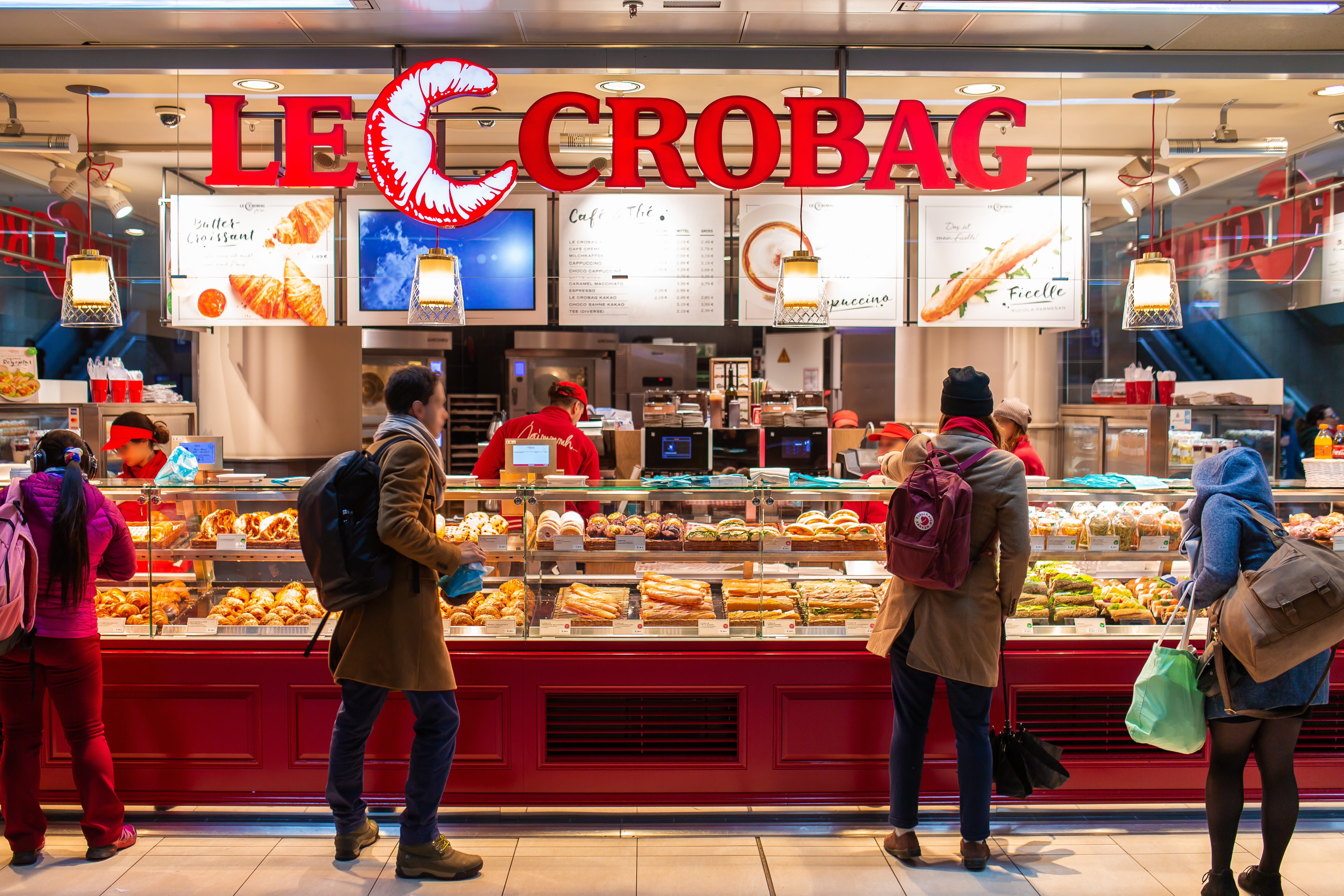 LECROBAG_Shop_Düsseldorf